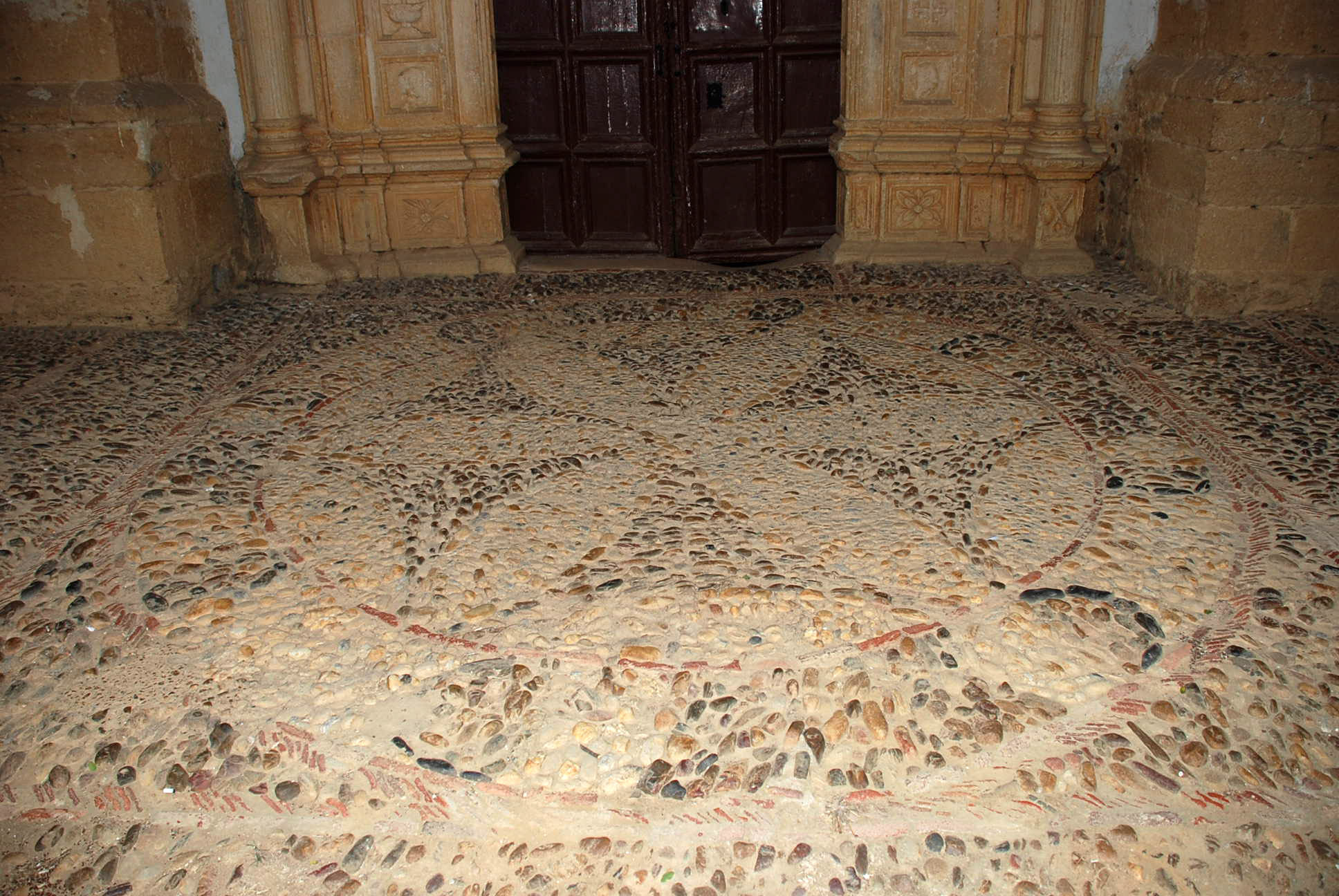 Portada de la Iglesia parroquial de Santiago Apóstol (Bárcena de Campos, Castilla y León). Empedrado a base de cantos de río o morrillos que forman una estrela o flor de 6 pétalos rodeada de un círculo con pequeñas tejas. Esta forma se repite en varias iglesias del valle de la Valdavia y aledaños, como en la Iglesia de Nuestra Señora de la Asunción de Villamelendro de Valdavia.